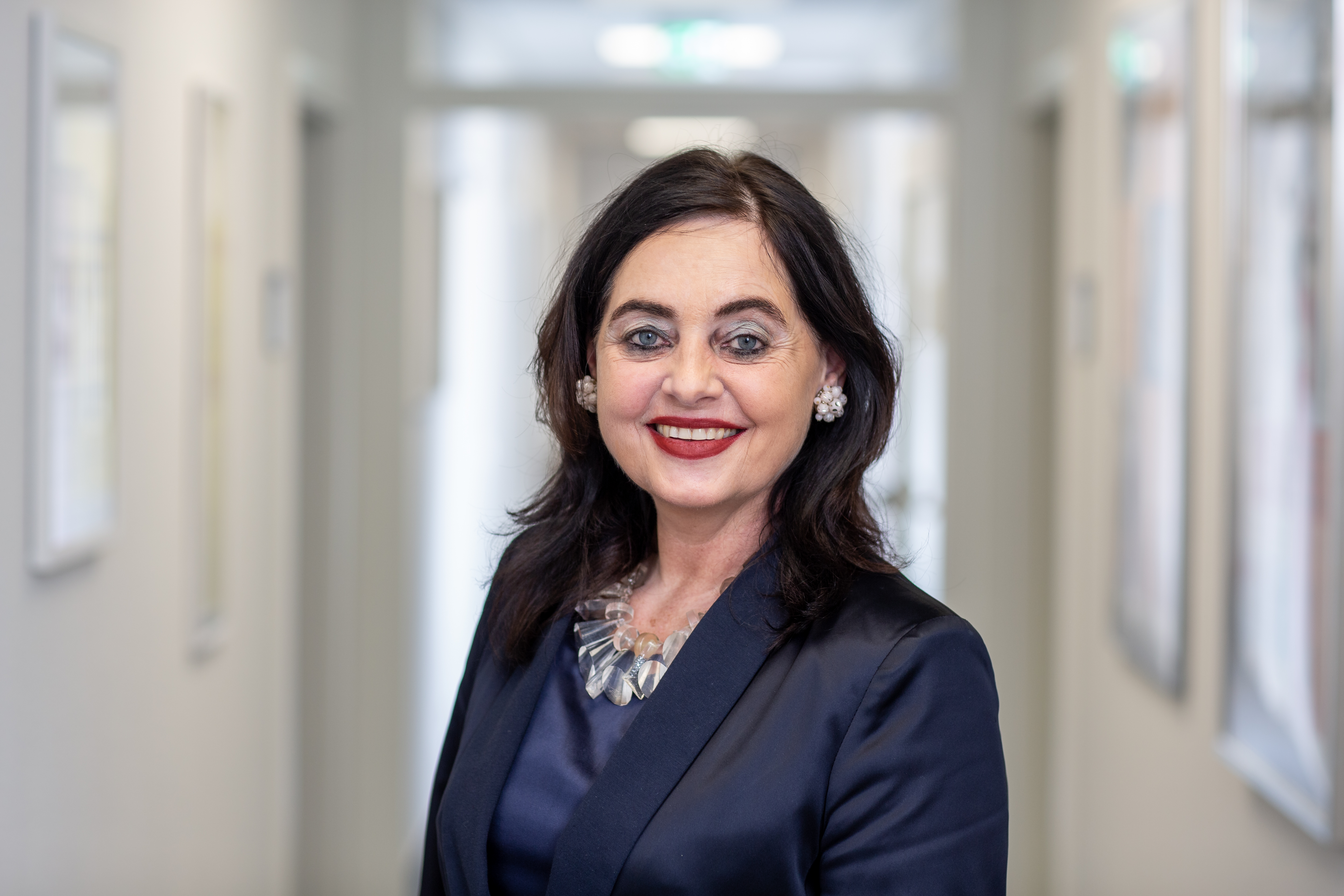 Porträt Claudia Spahn